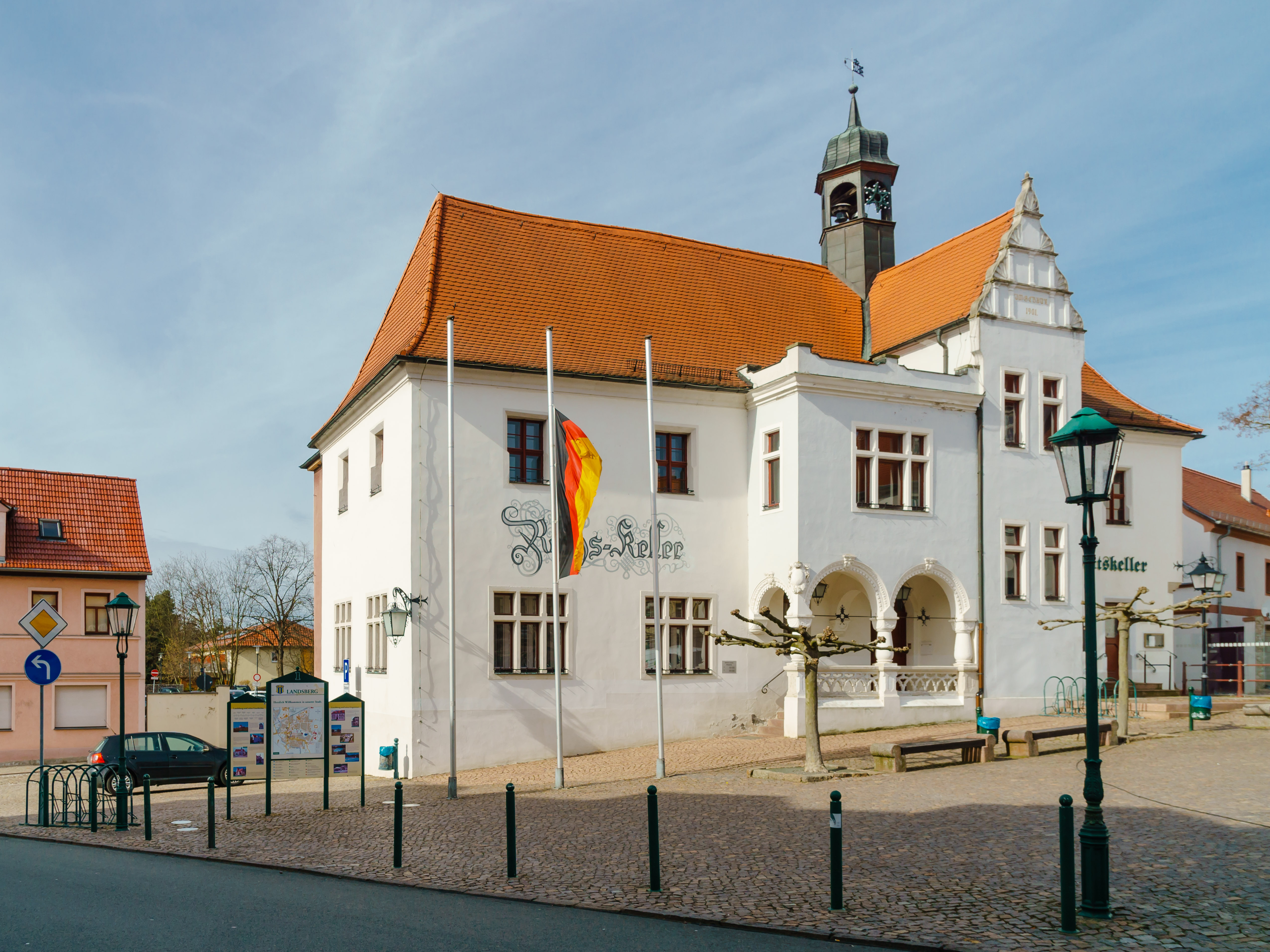 Rathaus, Markt 1 in Landsberg (Saalekreis)